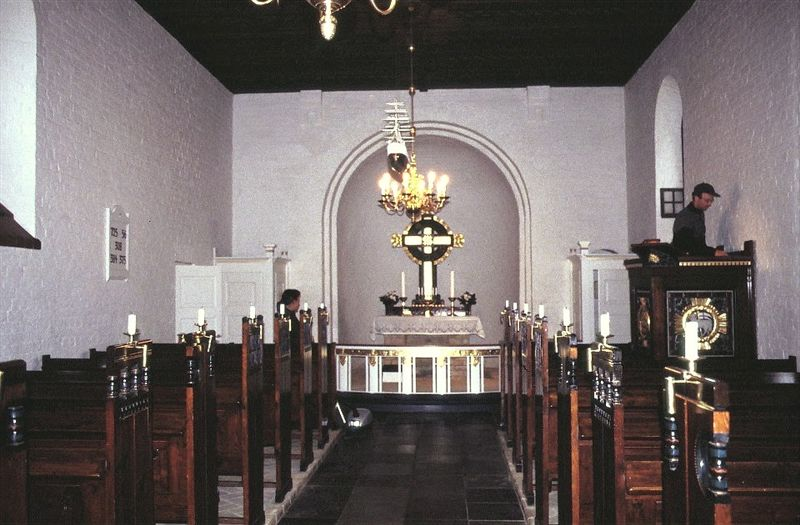 Hjermitslev Kirke i Danmark. Skibet set mod øst